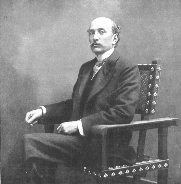 Retrato de Eduardo Dato por Kaulak y recogido en la revista española Nuevo Mundo.